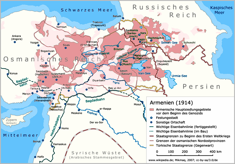 Armenische Hauptsiedlungebiete vor dem Beginn des Völkermords